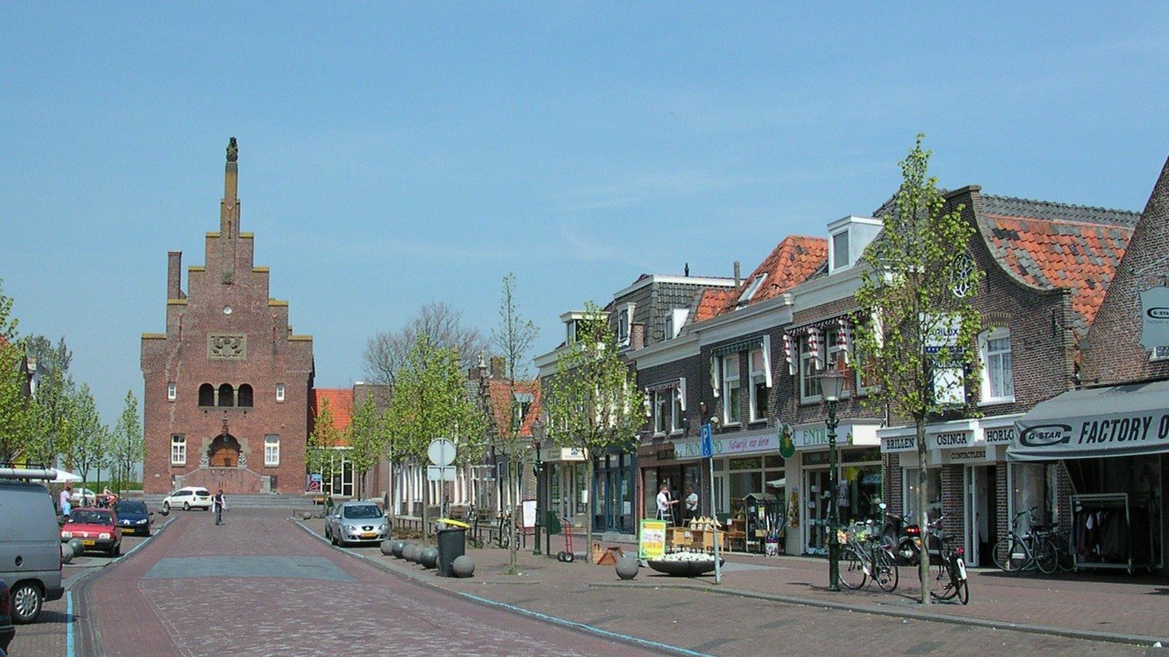 Het stadscentrum van Medemblik. The citycenter of Medemblik.